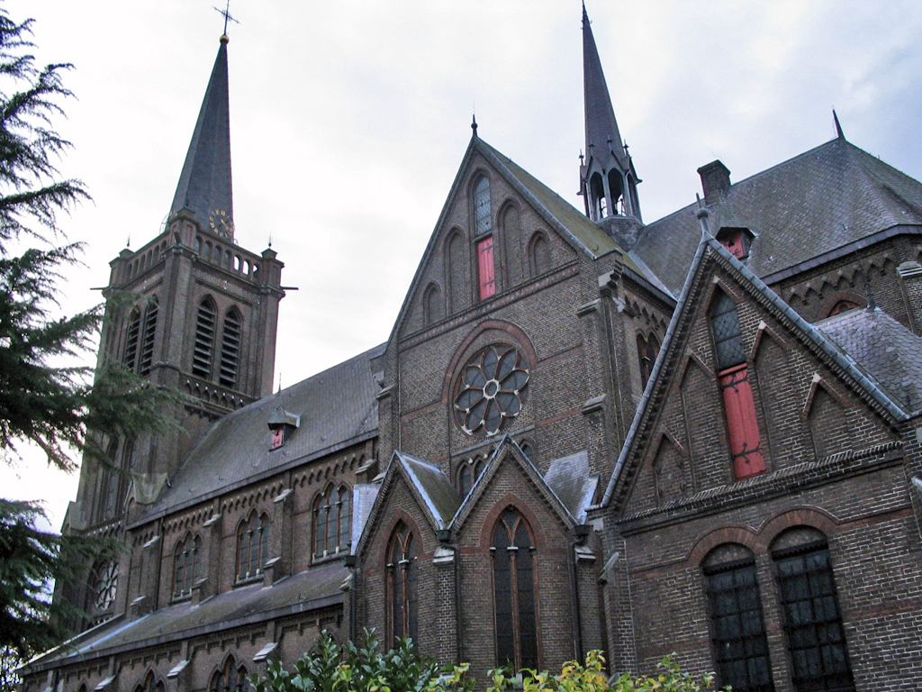 Zelf genomen foto van de kerk van Heeswijk